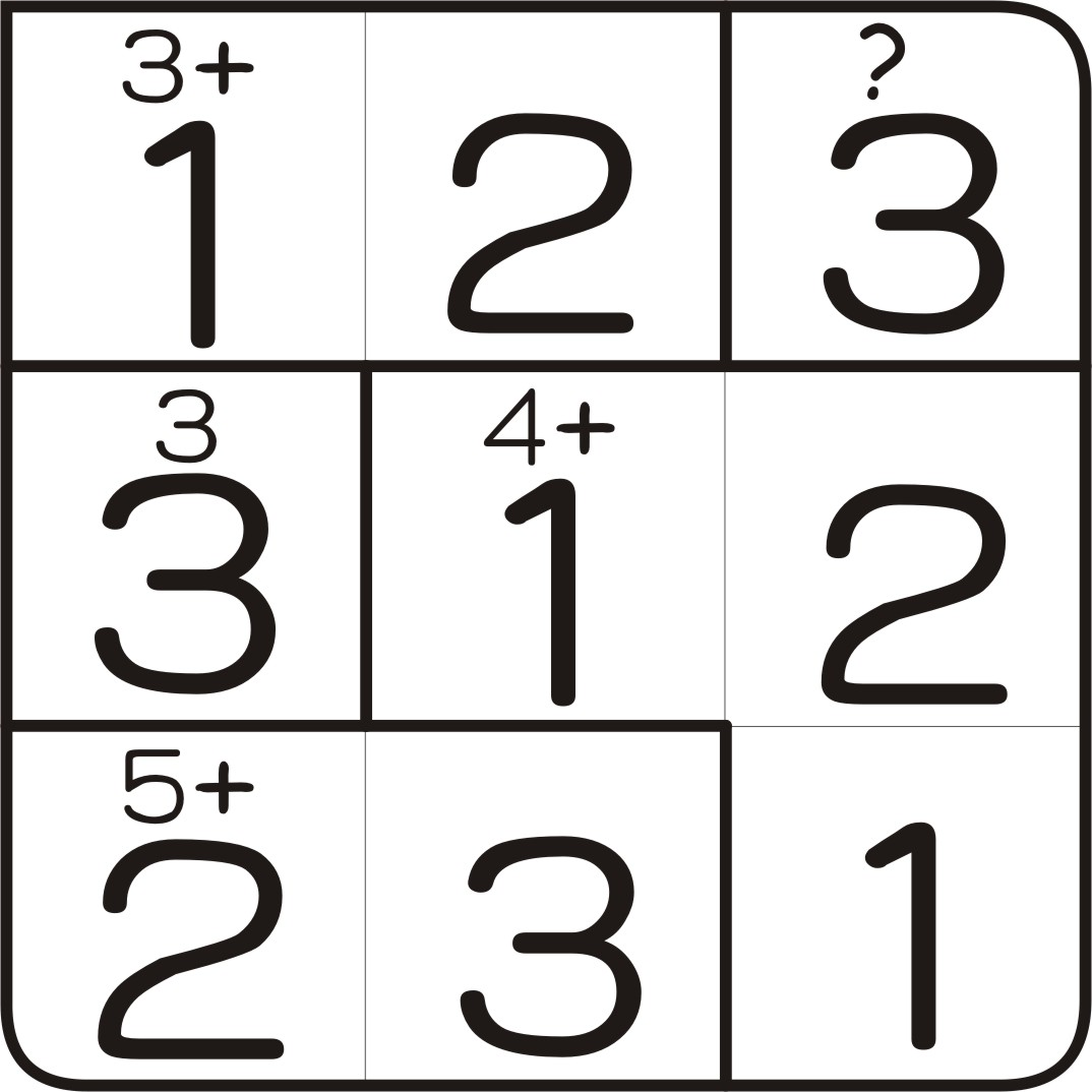 KENDOKU ANSWER